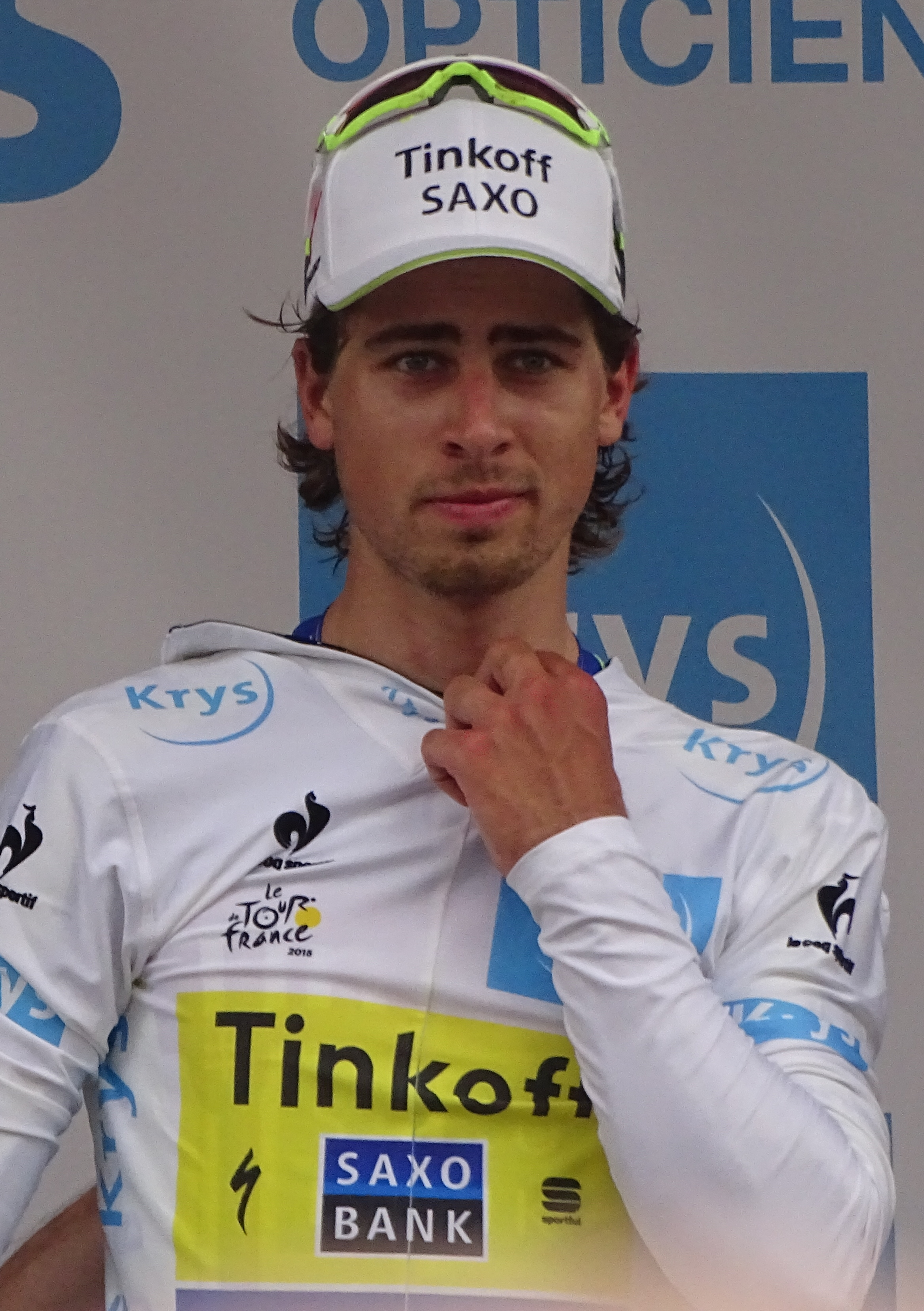 Reportage réalisé le mardi 7 juillet à l'occasion de l'arrivée de la quatrième étape du Tour de France 2015 à Cambrai, Nord-Pas-de-Calais, France.